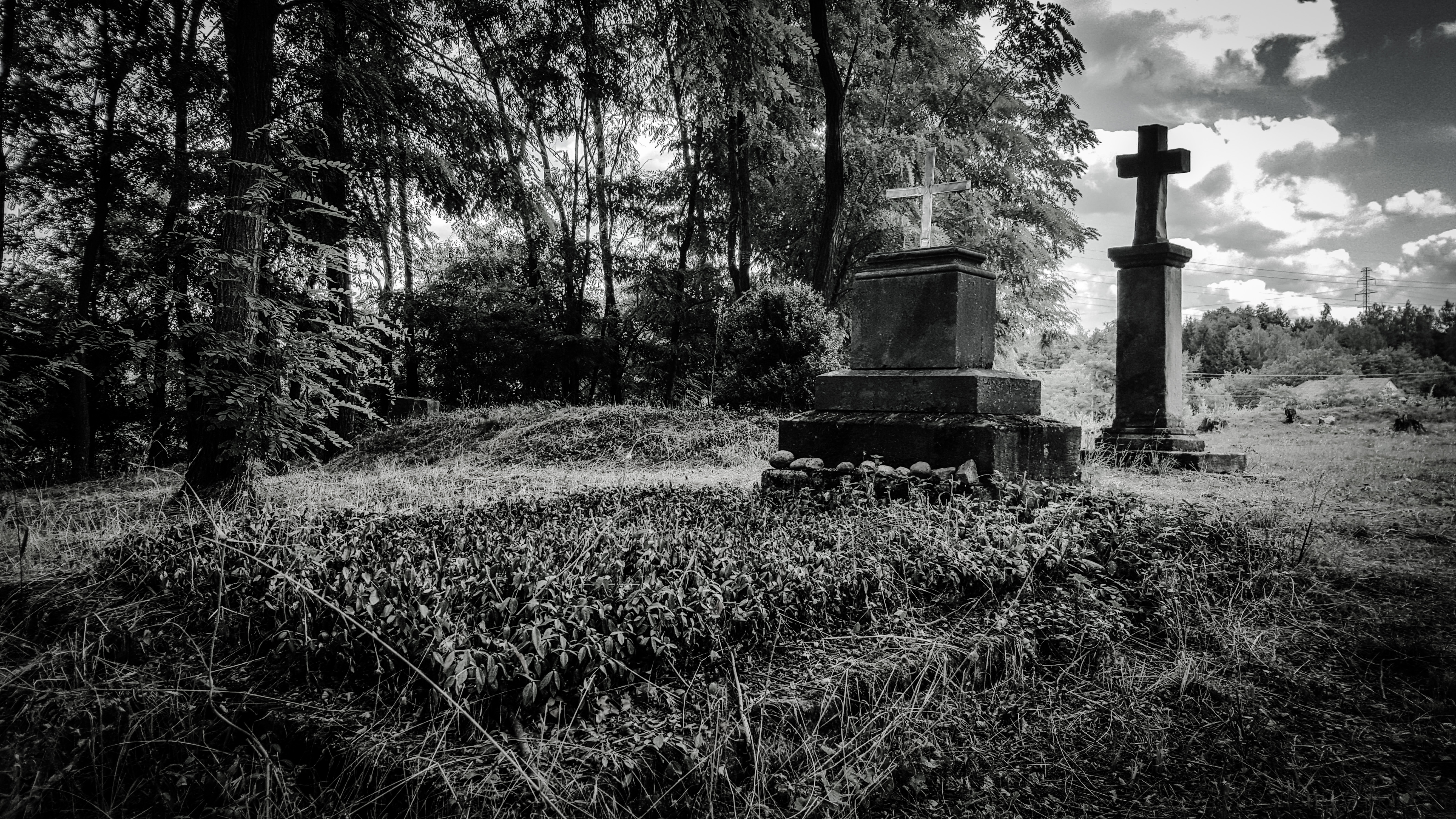 Cmentarz kalwiński w Szczepanowicach (powiat tarnowski)